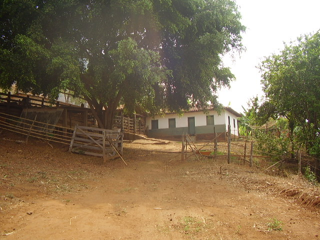 Esse é o sítio Córrego das Chaves, no município de Santo Antônio do Rio Abaixo.